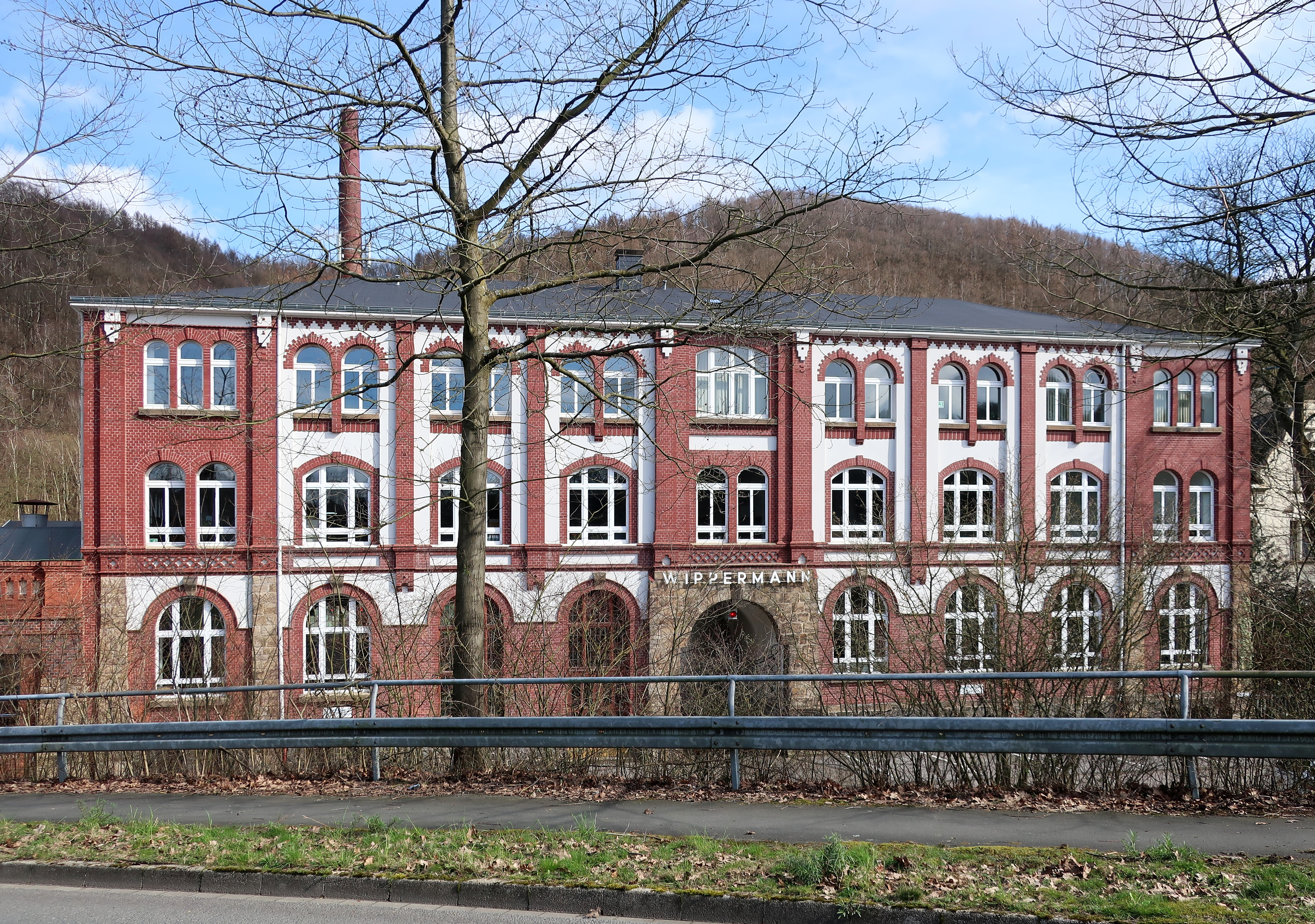 Denkmalgeschütztes Kontorgebäude der Firma Wippermann in Hagen-Delstern, Delsterner Straße 133; erbaut 1903. Architekt: Carl Post. Die Kettenfabrik wurde 1893 von Wilhelm Wippermann senior gegründet. This is a photograph of an architectural monument.